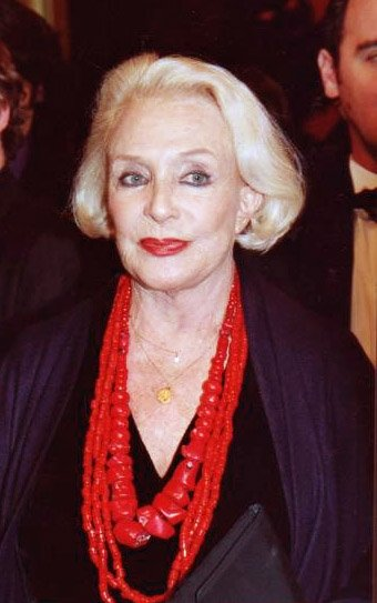 Micheline Presle à la cérémonie des césars.